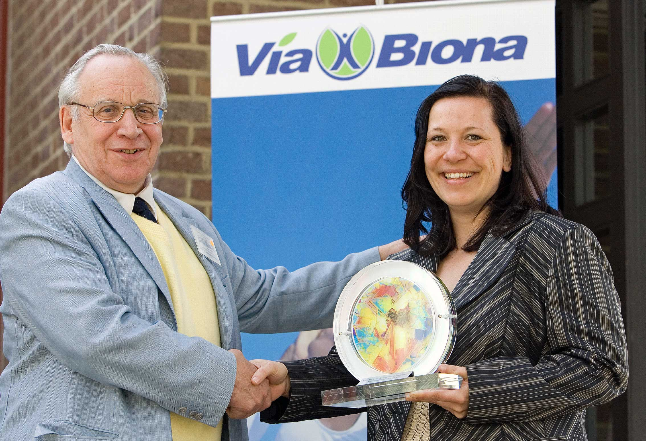 Prof. Dr. med Uhlenbruck bei der Übergabe des Wissenschaftspreises Mikronährstoffe an Diplom-Ernährungswissenschaftlerin Silke Schwarz.